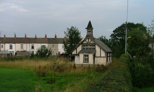 Former chapel, Dunsdale